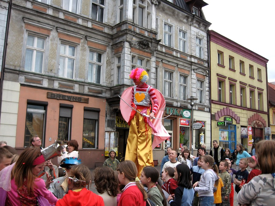 Madiawawe w Mysłowicach